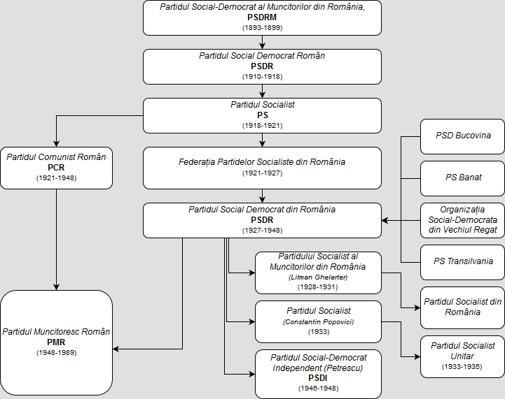 Diagramma evoluzione PSDR (Romania) 1893-1948 PSDR (Romania) evolution diagram 1893-1948 Diagrama evolutia PSDR (Romania) 1893-1948